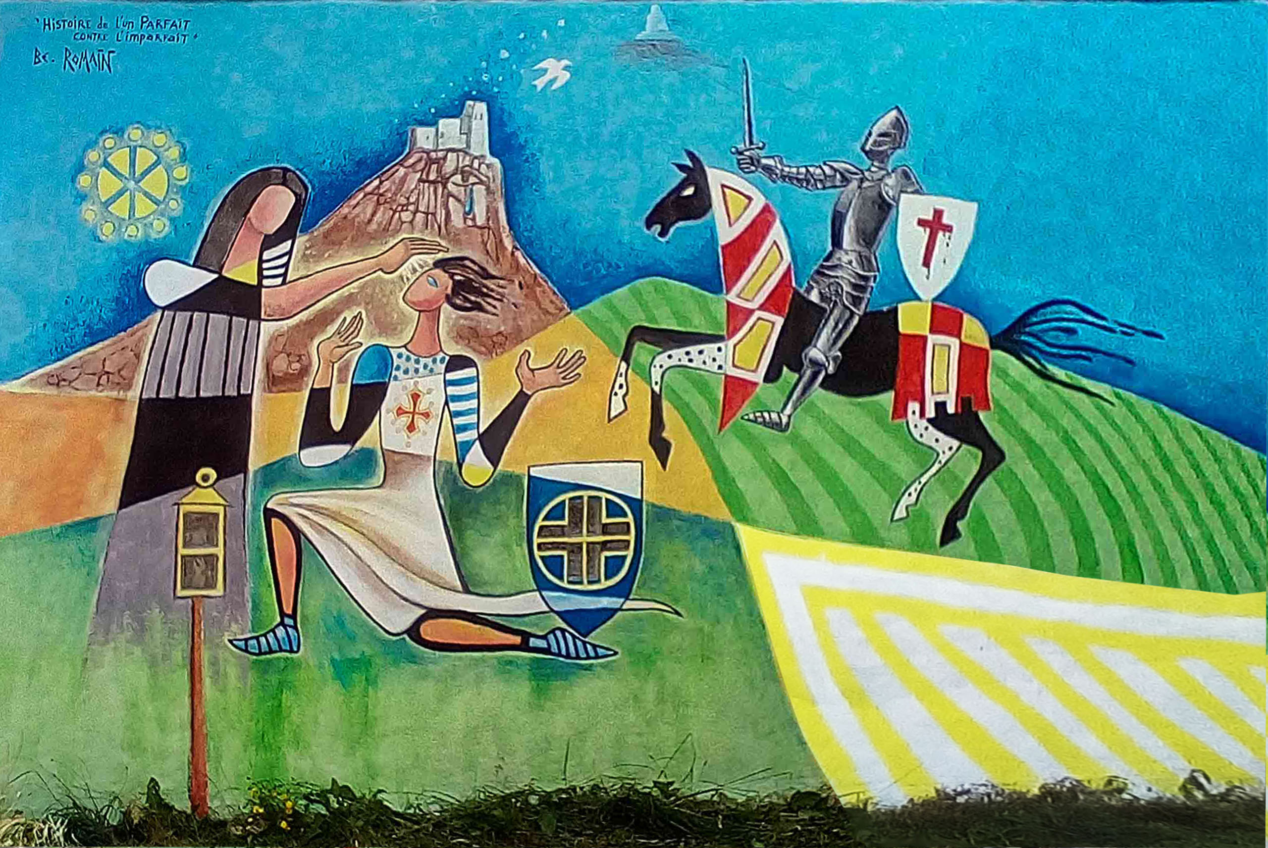 Les Cathares